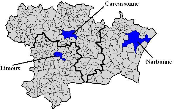 Les 3 arrondissemsnts de l'Aude